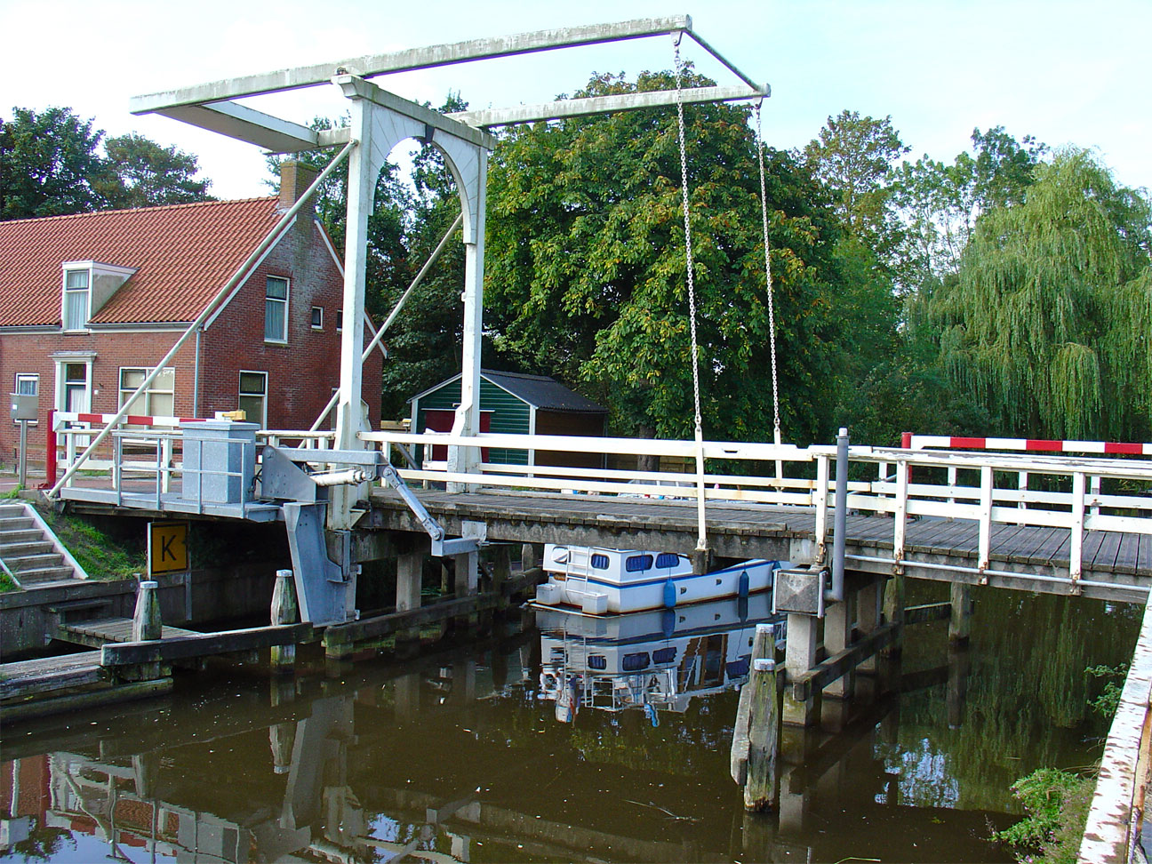 Wirdumerdraai in de gemeente Loppersum